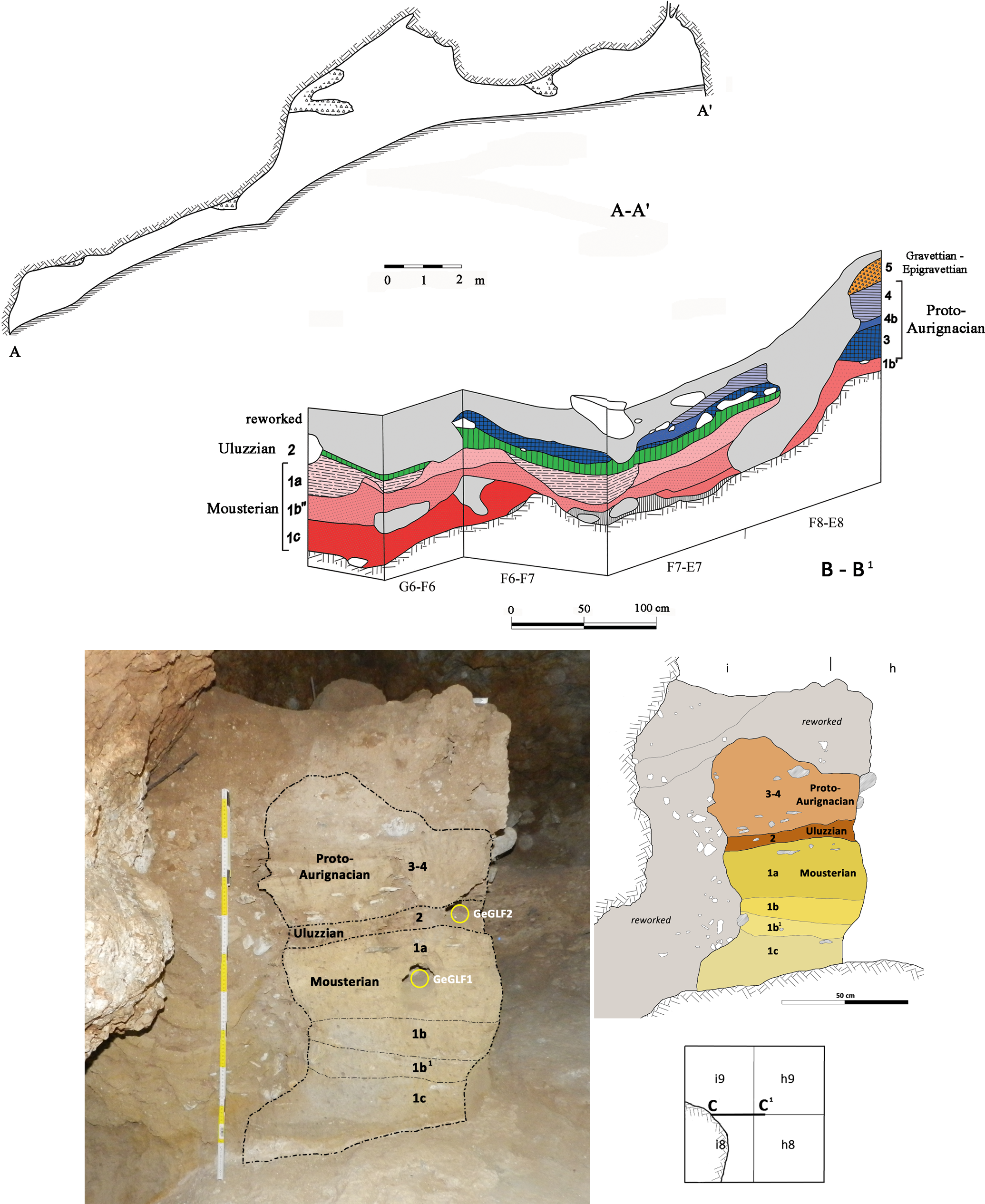 Coupe stratigraphique dans la grotte La Fabbrica en Italie centrale (référence : Villa and al. Plos One 2018)